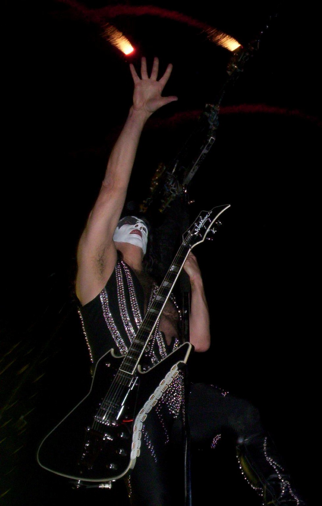 Paul Stanley en Bogotá, Colombia, 2009.